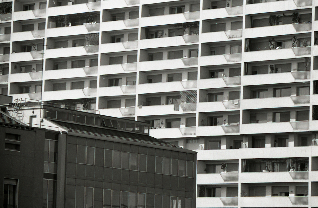 Serie fotografica : Milano, 1967 / Paolo Monti. - Strisce: 7, Fotogrammi complessivi: 37 : Negativo b/n, gelatina bromuro d'argento/ pellicola ; 35 mm. - ((Sul portanegativi: [NIKMAT?] FP4. - All'interno del portanegativi in corrispondenza dei numeri dei fotogrammi stampati sulla faccia interna del contenitore sono riportati i relativi dati tecnici e annotazioni (dati di ripresa). - . - Occasione: Prove